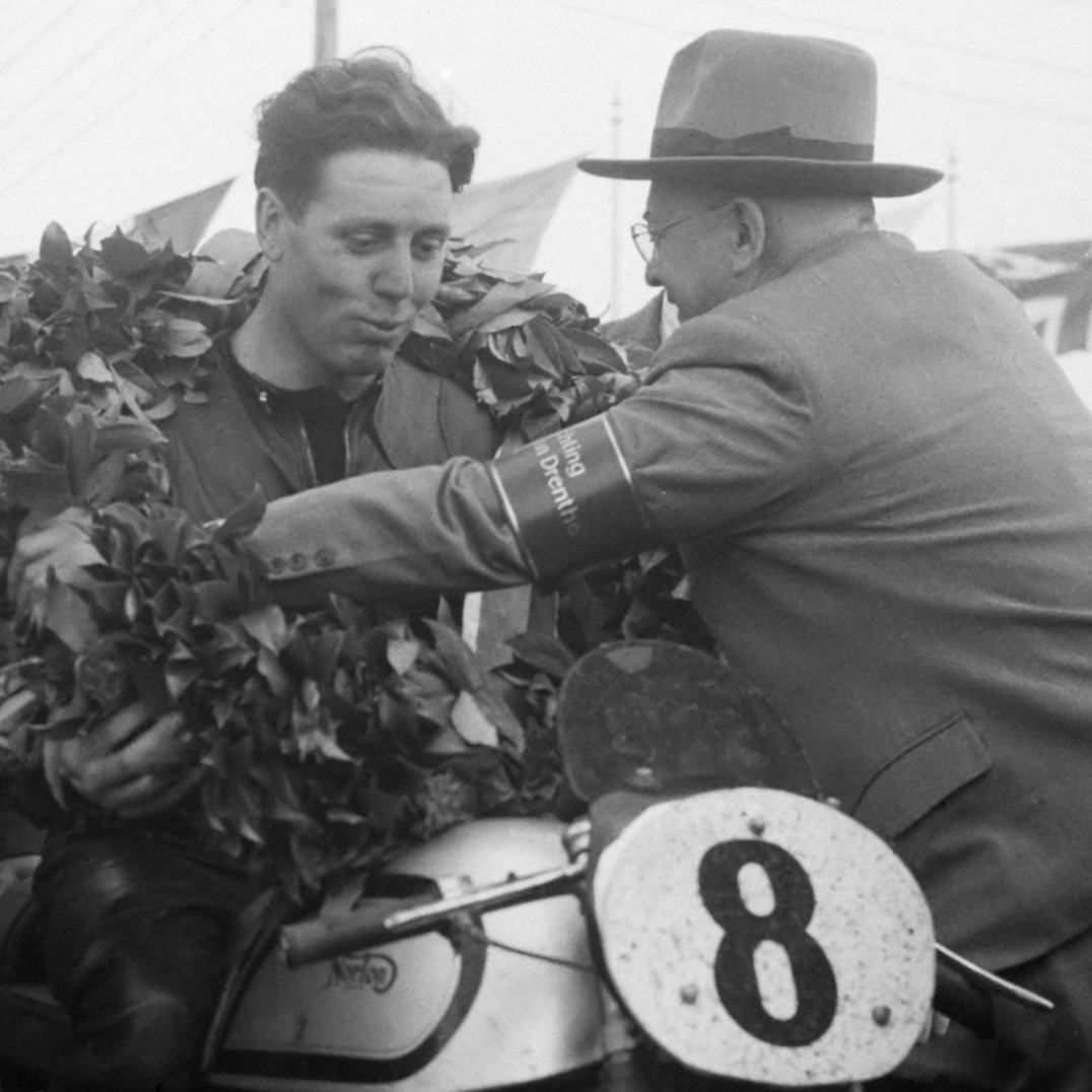 TT-races in Assen 500 cc Duke (norton) winnaar huldiging 7 juli 1951